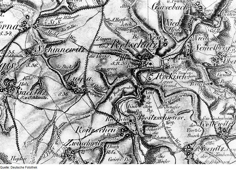 Original image description from the Deutsche Fotothek Triebischtal-Roitzschen. Oberreit, Sect. Freiberg, vor 1843 (Talstraße 46, oberschlächtige Wassermühle, 1965 stillgelegt)